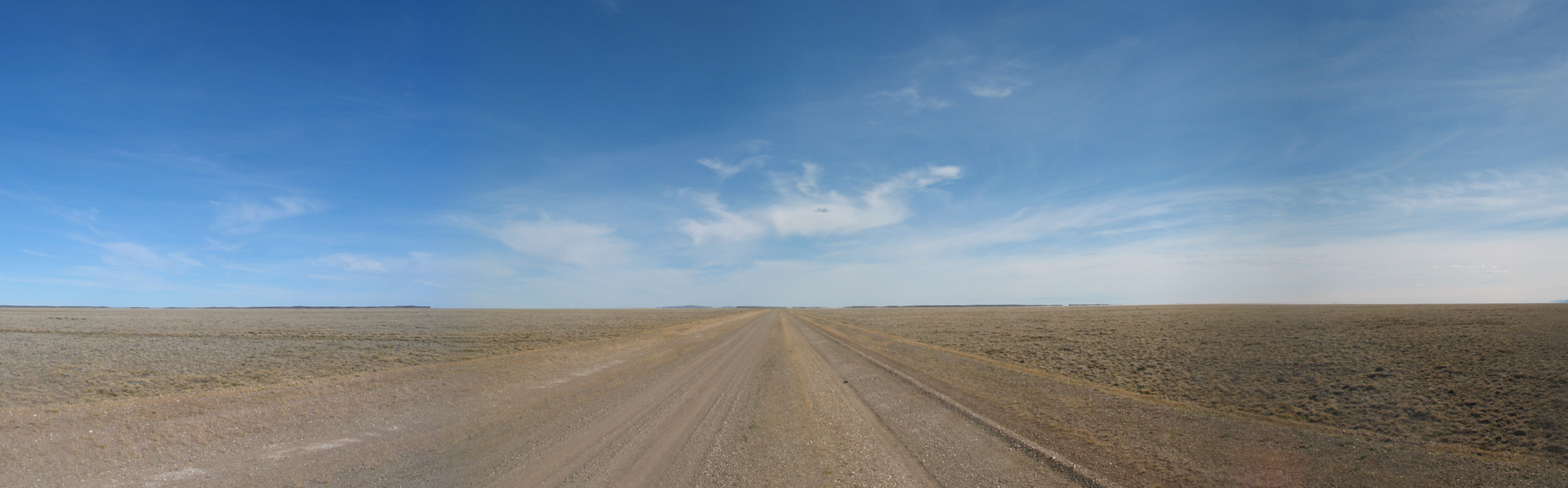 Ruta Nacional 40 (Argentina)